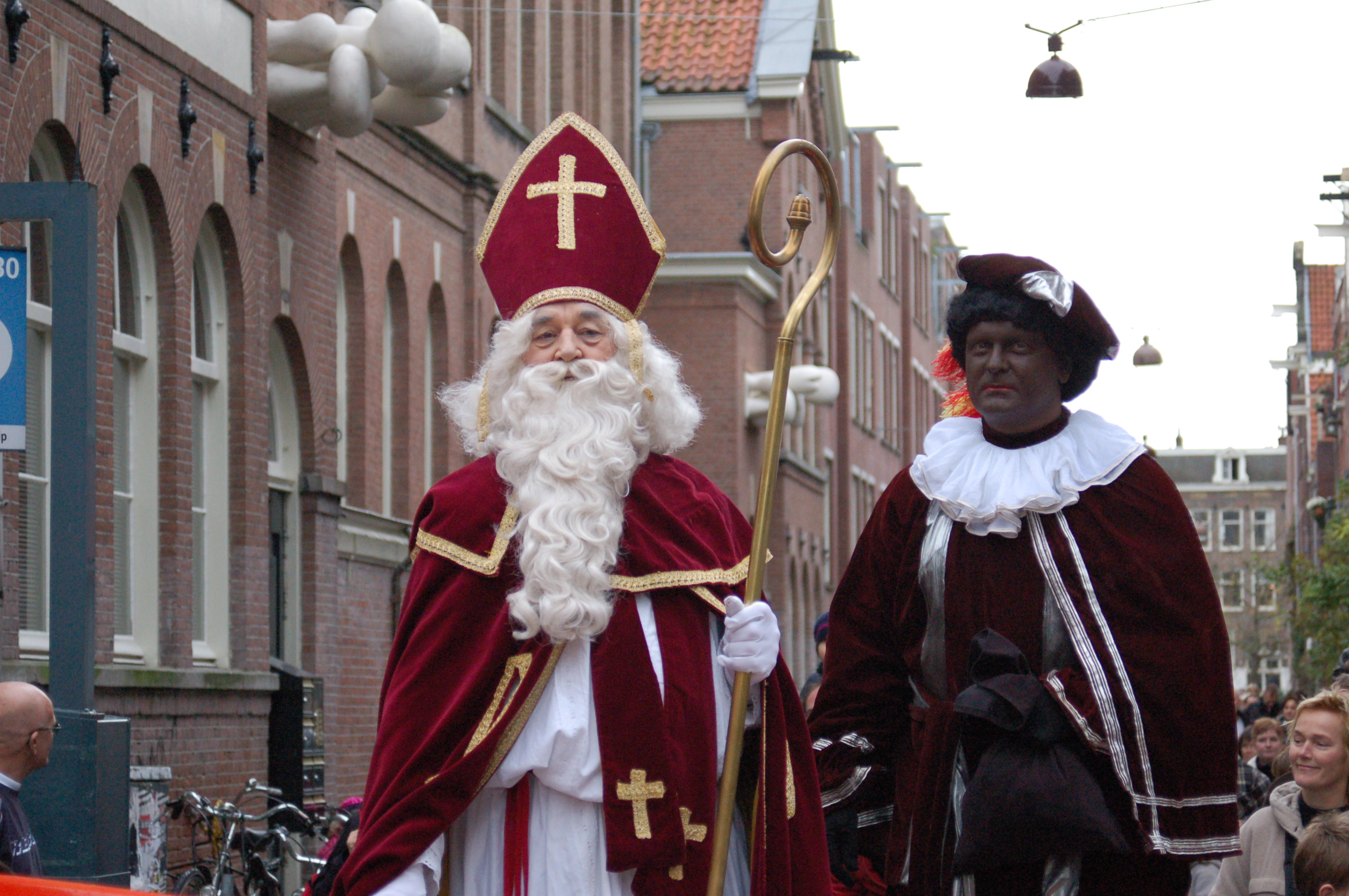 Portrait of Sinterklaas and Zwarte Piet.